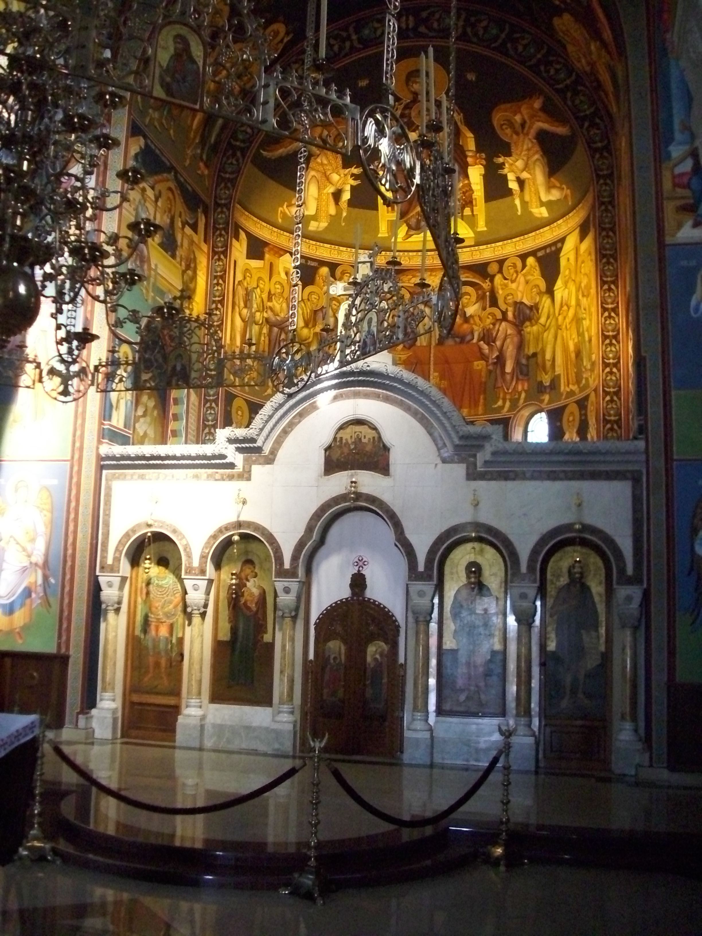 Спомен црква у Лазаревцу, посвећена палима у Колубарској бици. Црква је изграђена по пројекту архитекте Ивана Рика 1938-1941. године.